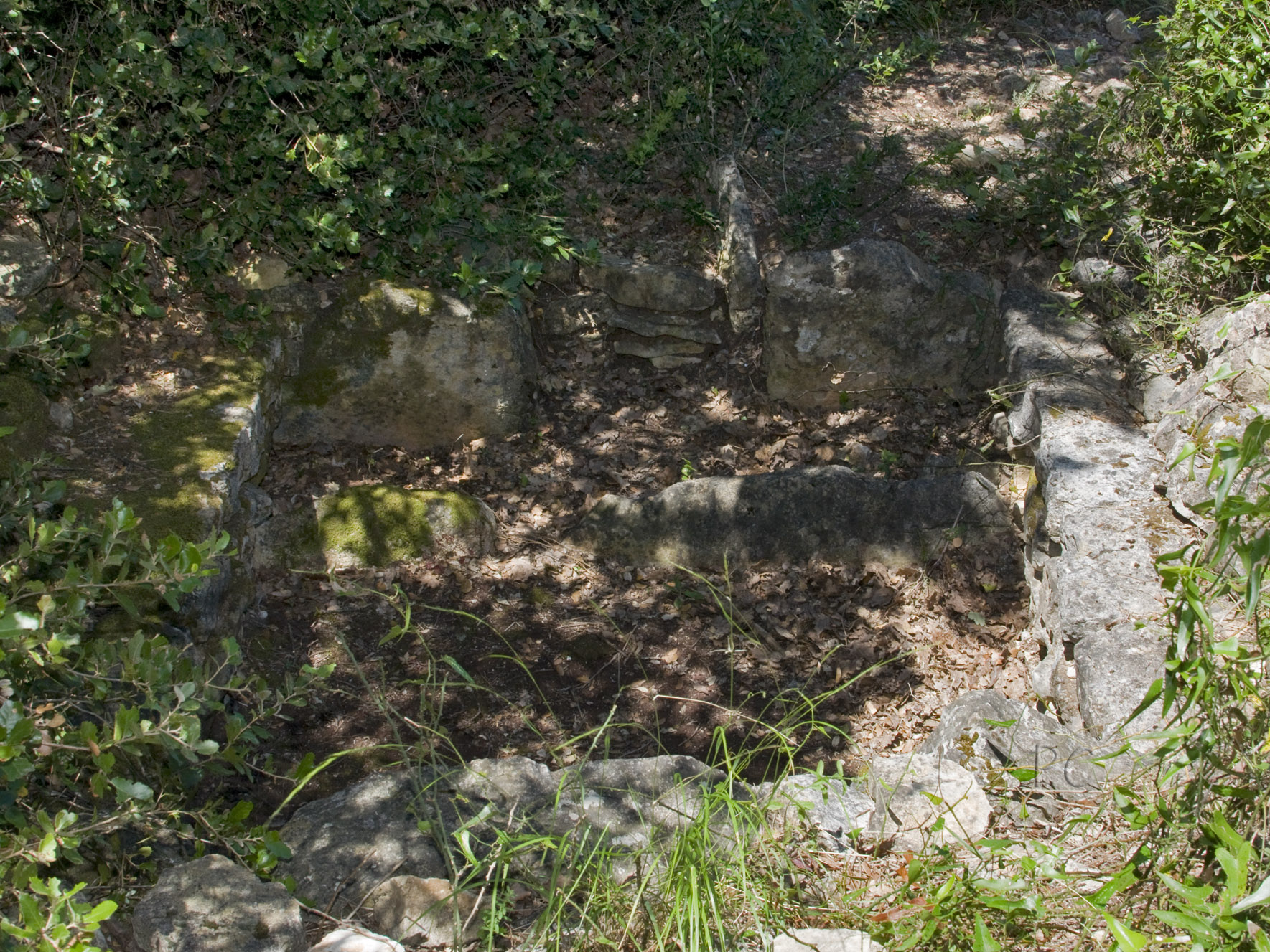 Dolmen découvert par Georges Bérard dans les années 1960.